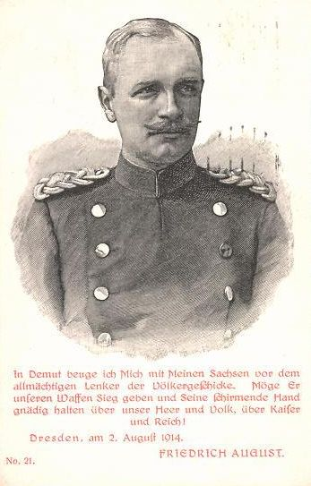 PKönig Friedrich August III. um 1914